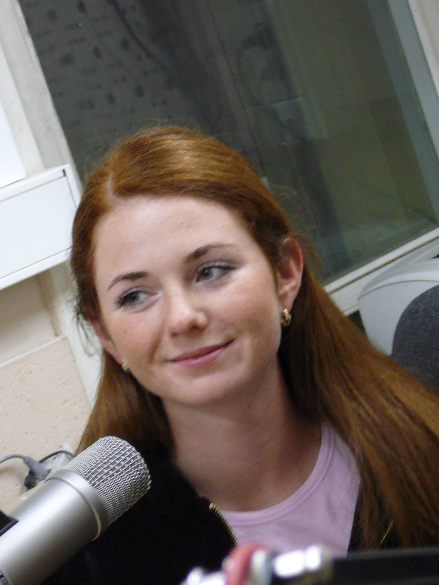 Lena Katina